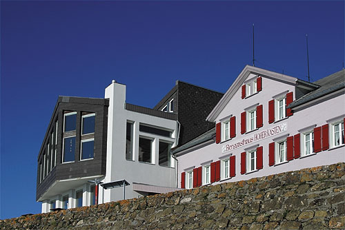 Berggasthaus "Hoher Kasten" (1795 m.ü.M.) ob Brülisau